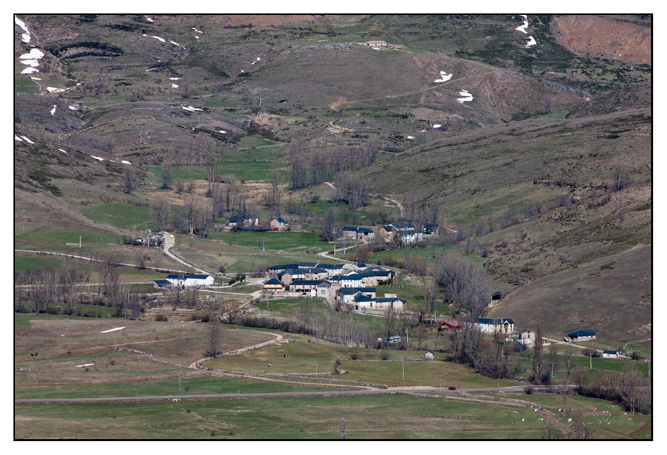 Las Murias